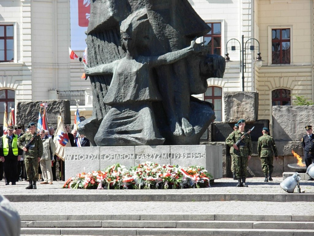 Pomnik Walki i Męczeństwa monument in Bydgoszcz